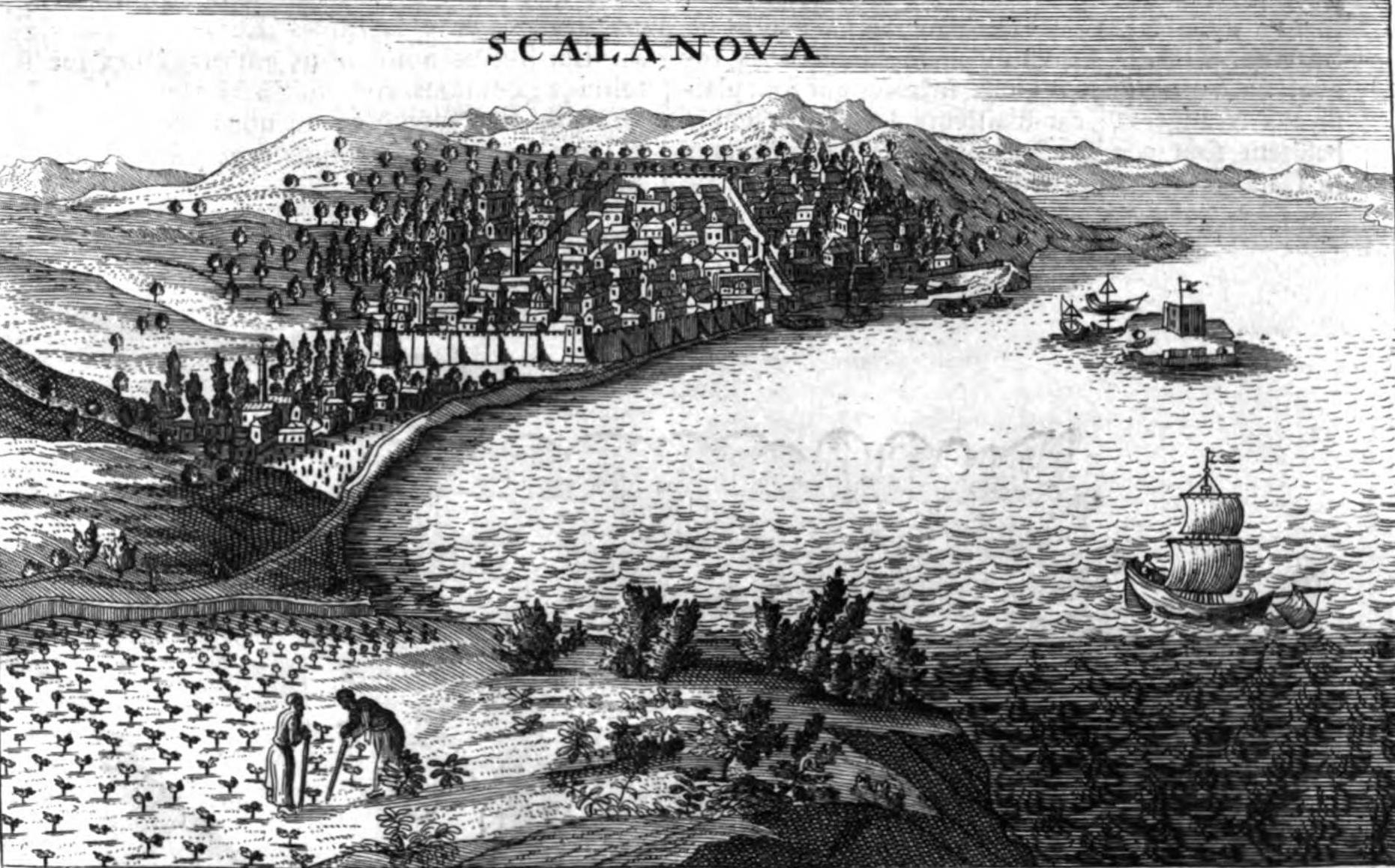 Relation d'un voyage du Levant: fait par ordre du Roi : contenant l'histoire ancienne & moderne de plusieurs isles de l'Archipel, de Constantinople, des Côtes de la Mer Noire, de l'Armenie, de la Georgie, des frontières de Perse & de l'Asie Mineure.